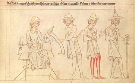 Velislavova bible - Izraelité v Jeruzalémě se obávají Holoferna